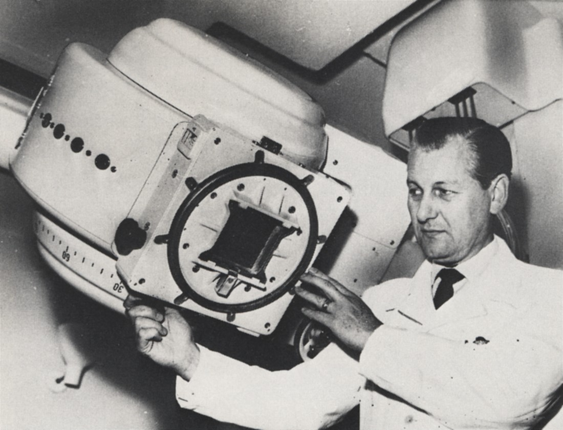 Professor Sven Hultberg demonsterar den nya gammatronen 1958